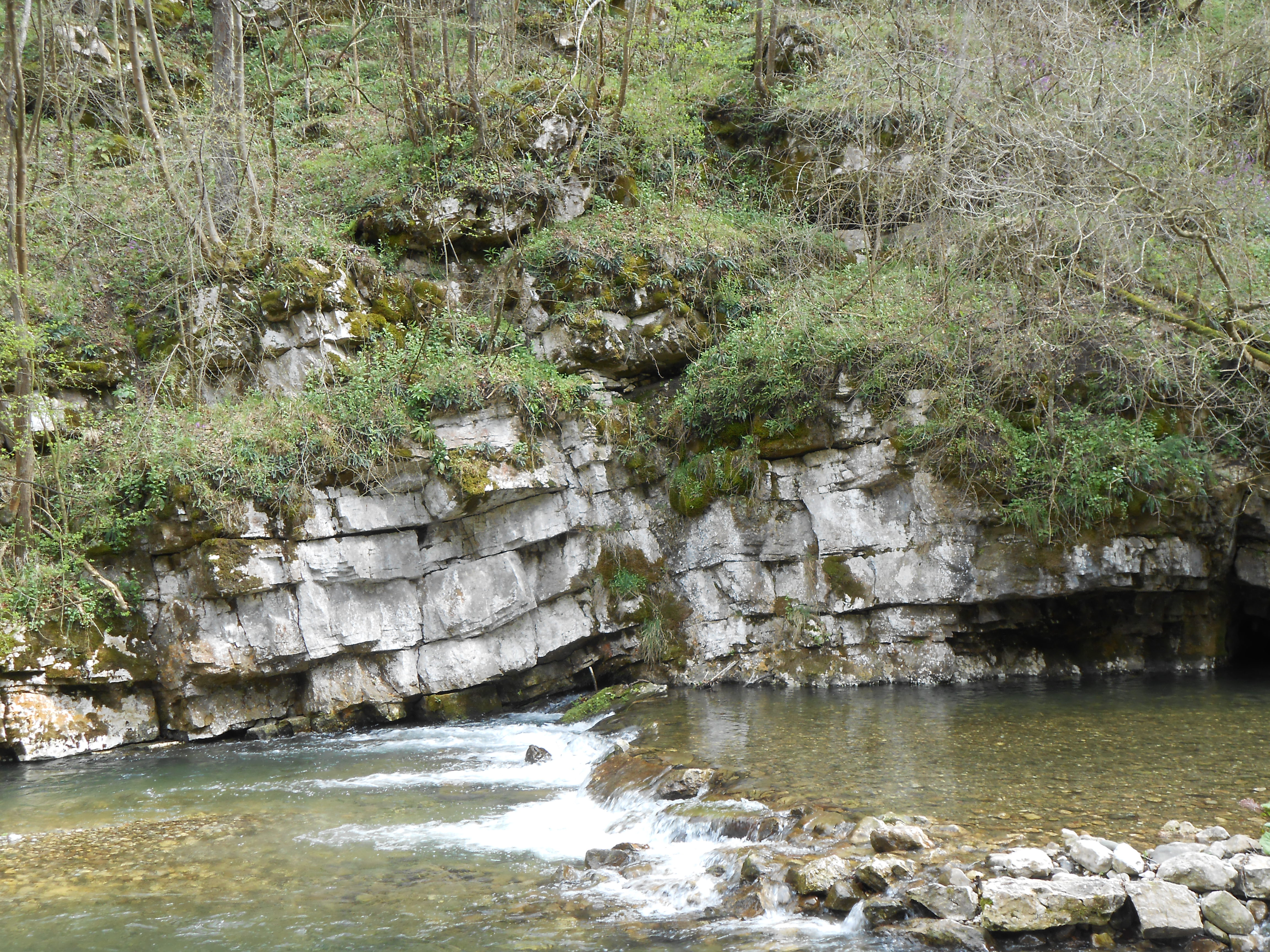 Седиментне стене